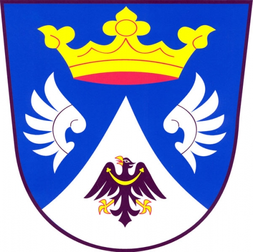 znak,Netín , okres Žďár nad Sázavou